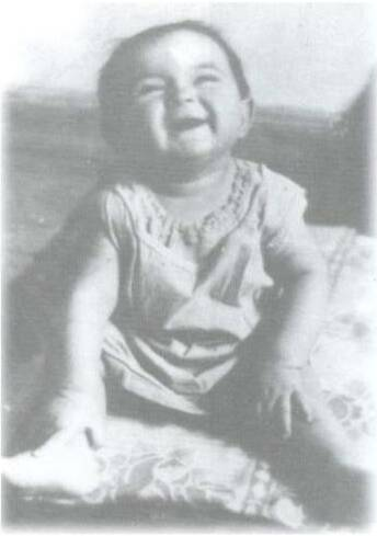 Hüseyin Nihâl Atsız 7 aylıkken.